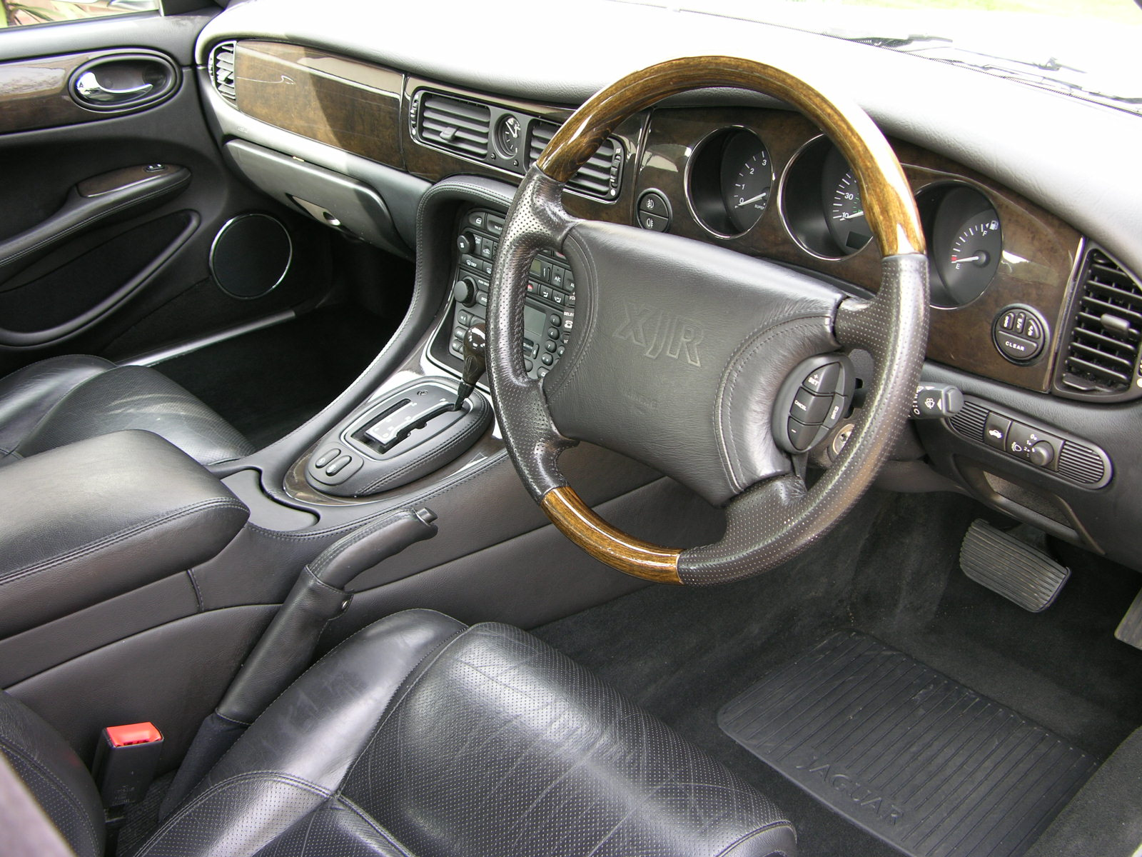 Jaguar XJR 1998